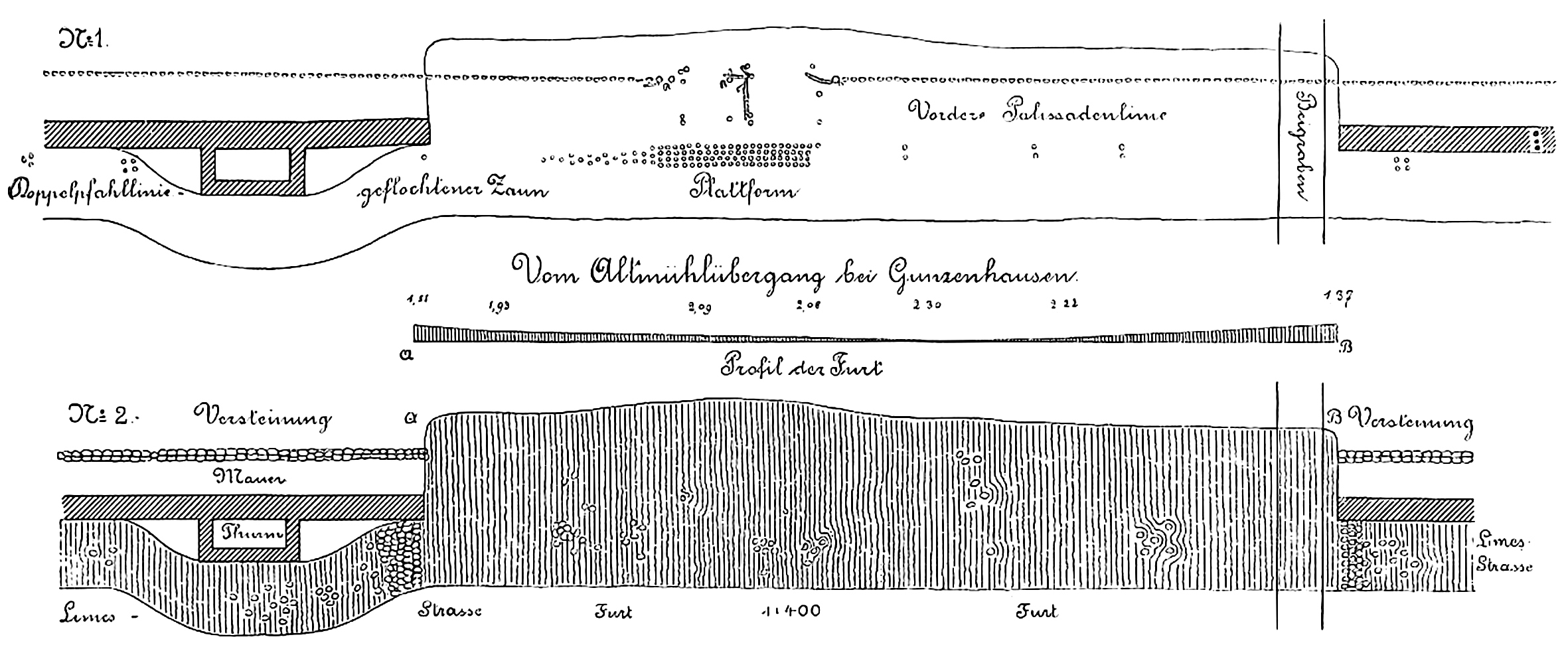 Raetischer Limes, Bayern: Wp 13/54 mit Altmühlfurt. Aufnahme der Untersuchungen vom Spätherbst 1895.